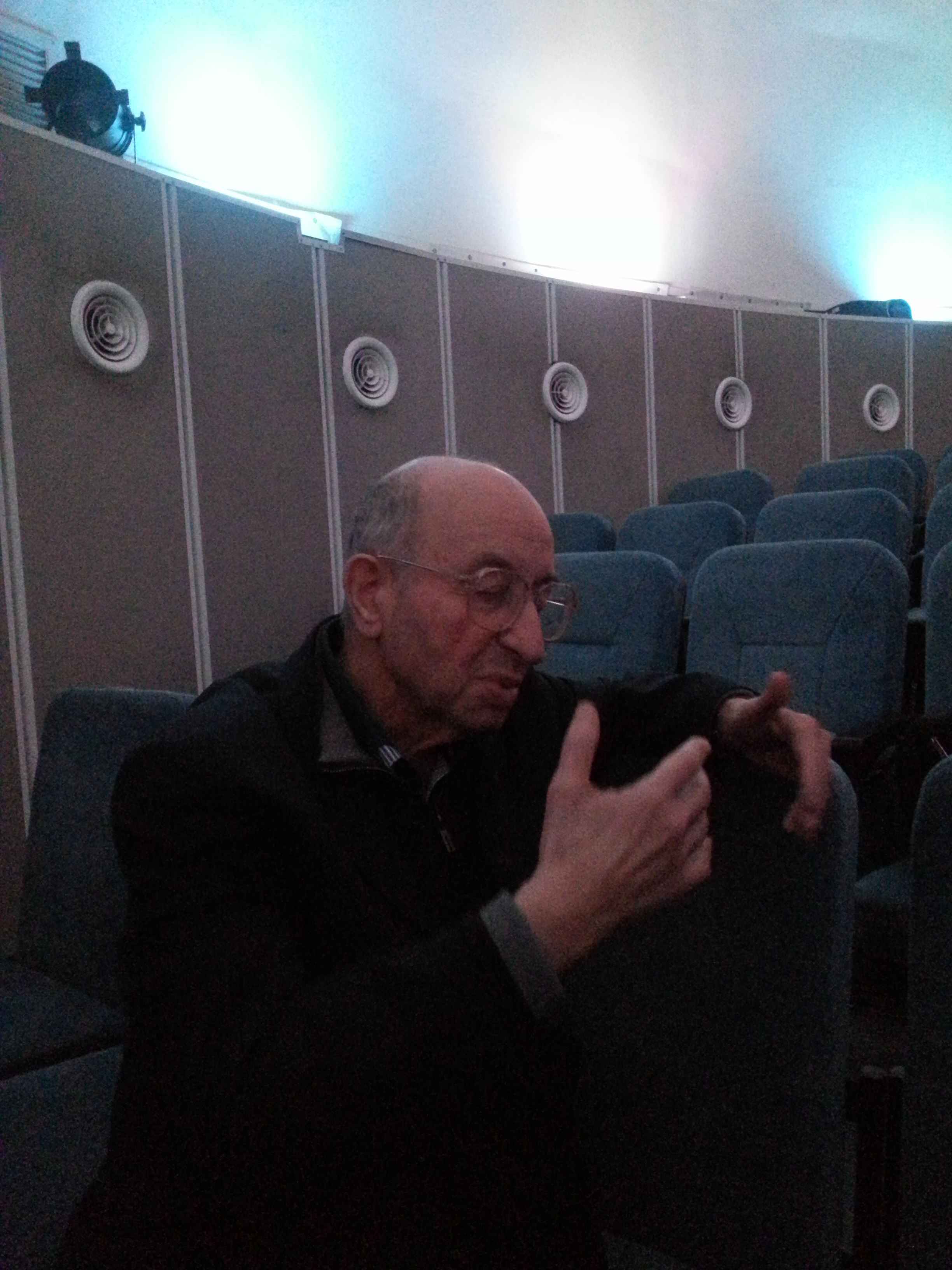 Борис Валентинович Комберг в Нижегородском планетарии 10 декабря 2014 года